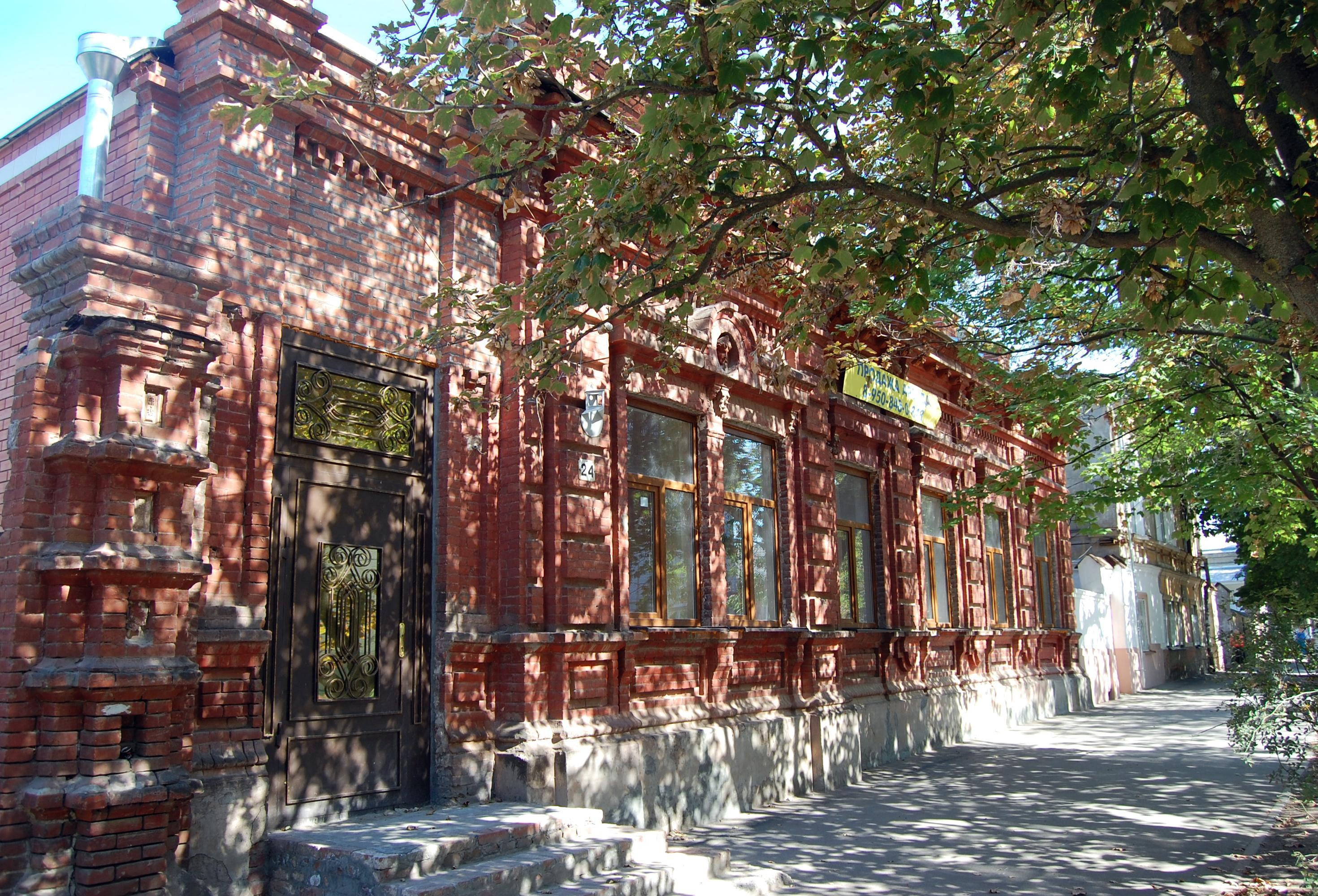 Фасад особняка "Дом Рабинович", Таганрог